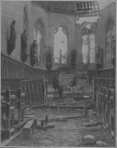 destruction de l'église de Bouchoir lors de la première guerre mondiale, parution en 1914 dans l'hebdomadaire Le Pays de France N°15.